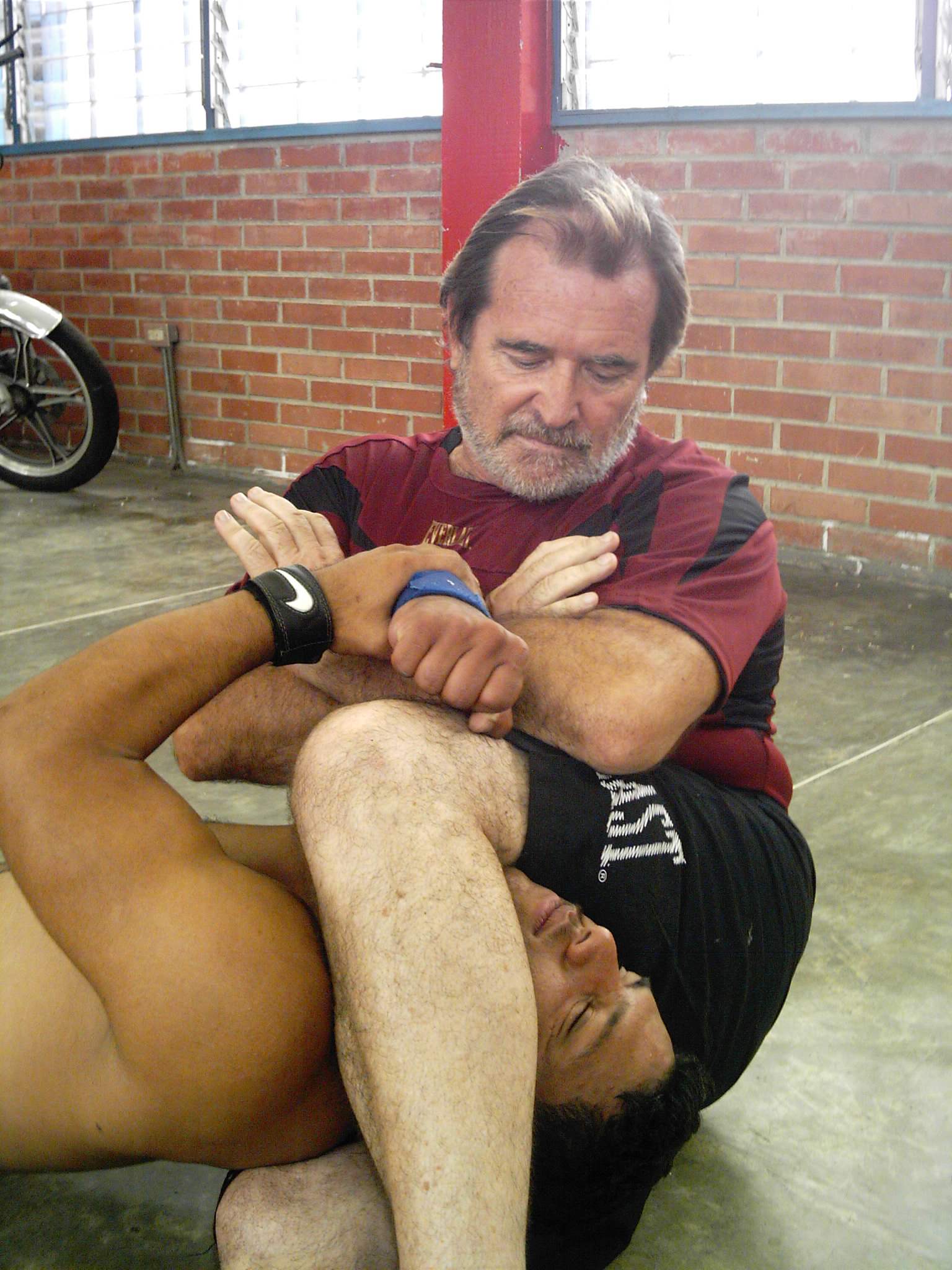 tecnica combate de sumision karive